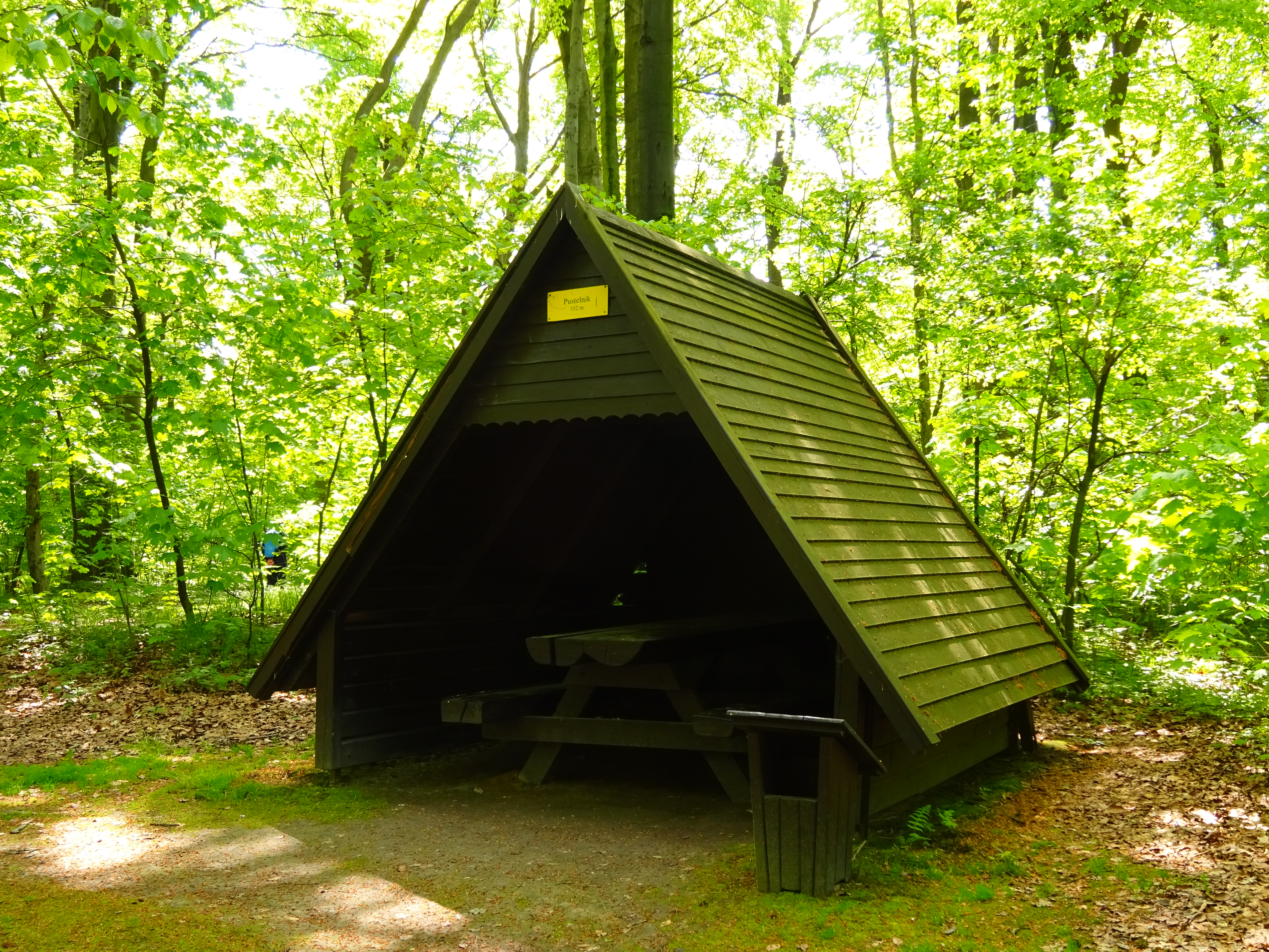 Altana na szczycie Pustelnika w Lesie Wolskim w Krakowie.